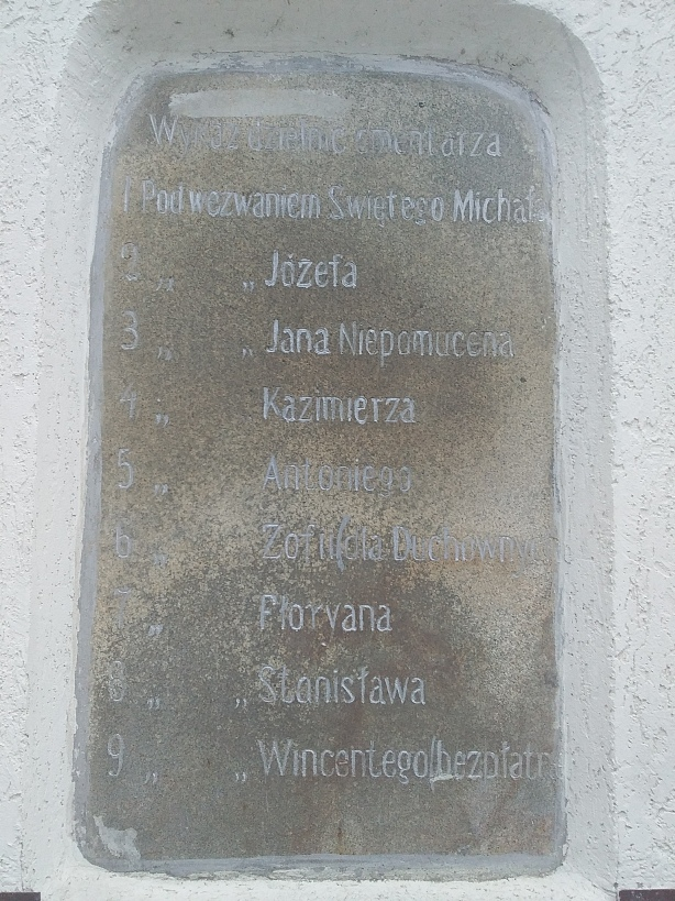 Польське кладовище у Житомирі